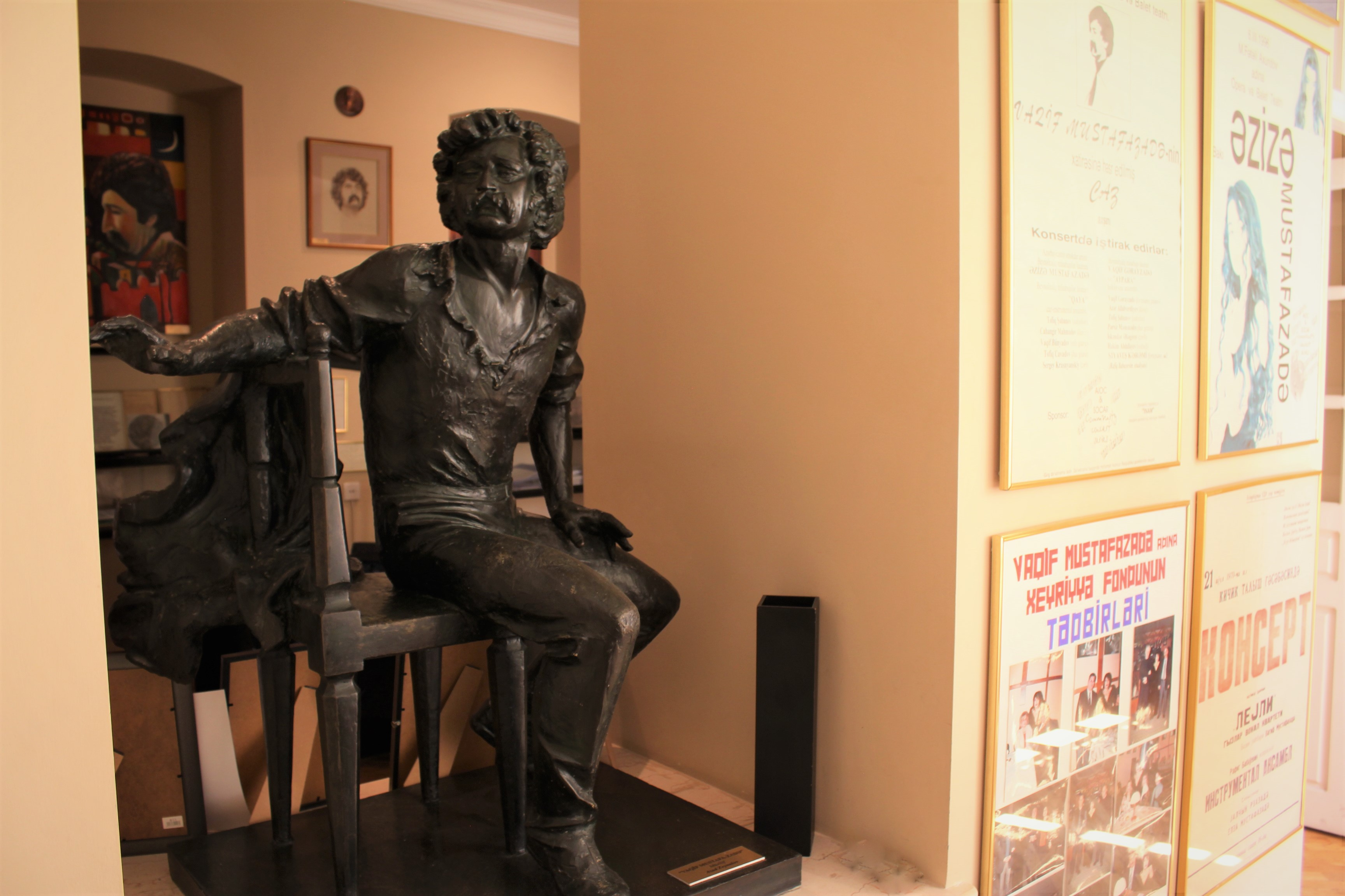 Экспонаты в доме-музее азербайджанского джазового композитора и пианиста Вагифа Мустафазаде.